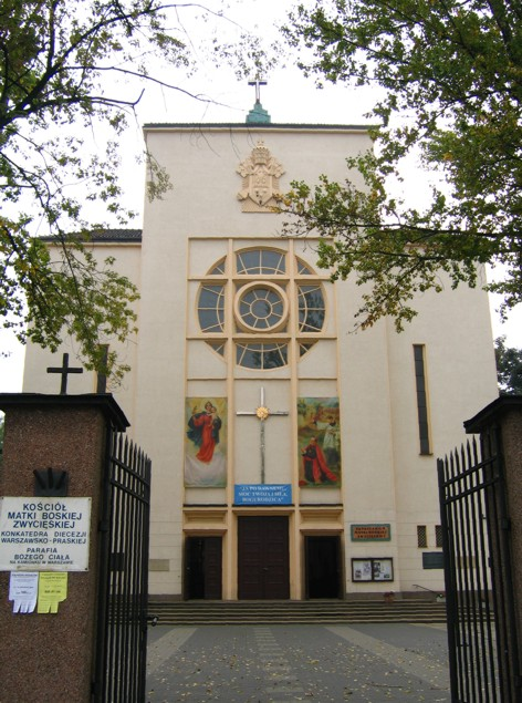 Kościół Matki Boskiej Zwycięskiej na Kamionku, konkatedra diecezji warszawsko-praskiej.